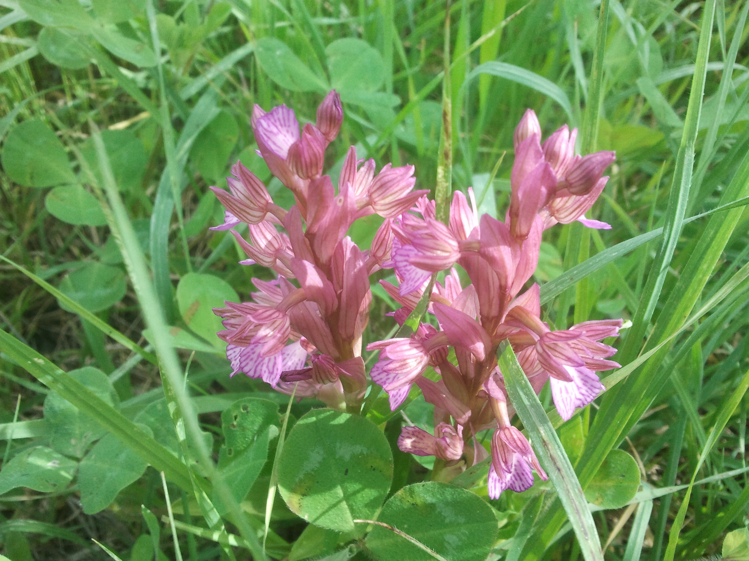 סחלב פרפרני הוא אחד המינים הנפוצים ביותר של הסוג סחלב בישראל, צולם בנחל תות